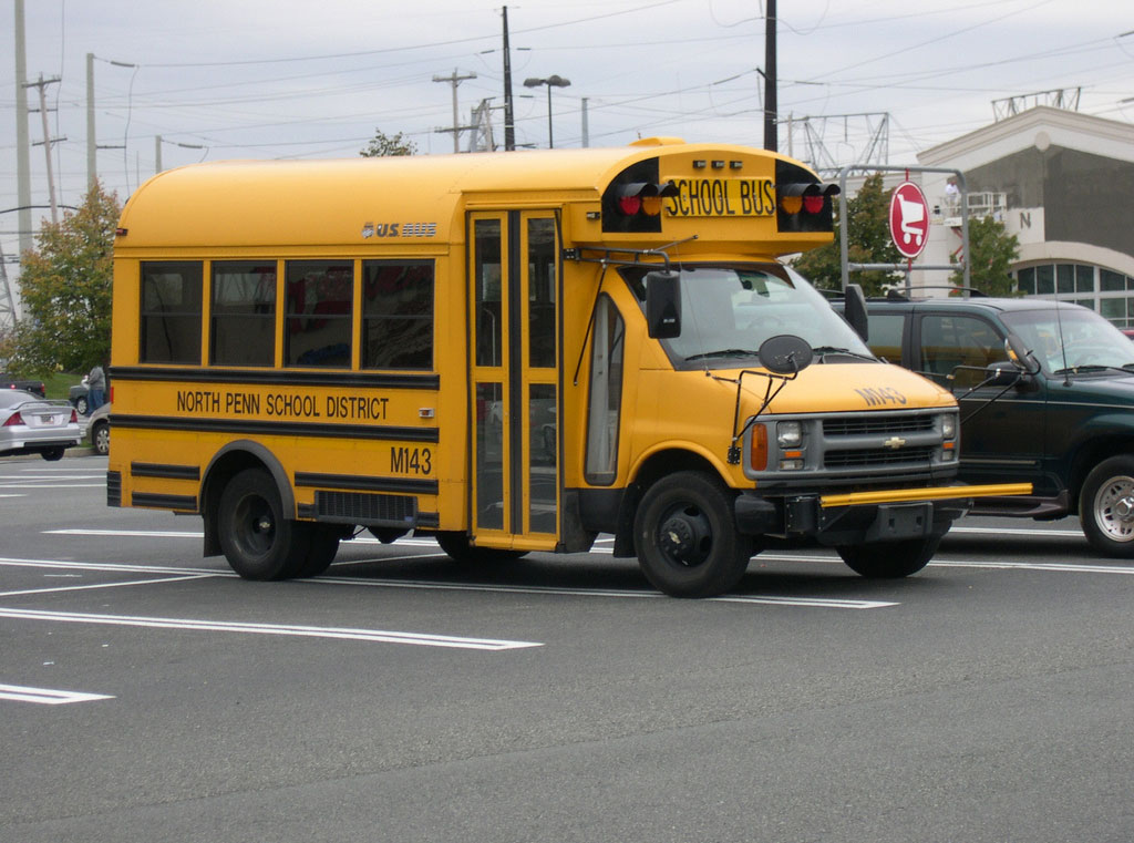 Chevrolet Van School Bus